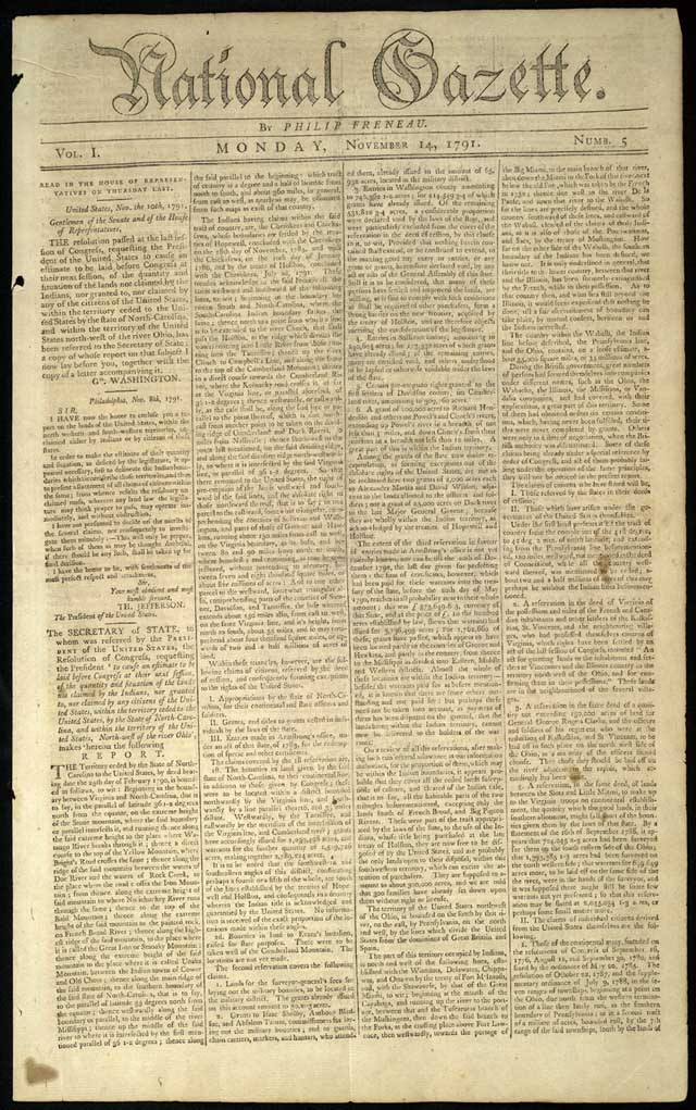 National Gazette, Vol. I, Numb. 5